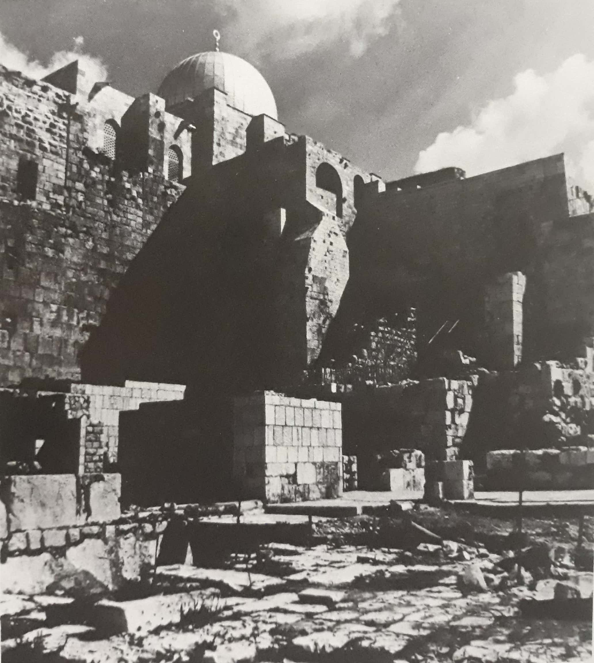 القصور الأموية (دار الامارة)، وتعرف منها ثلاثة قصور الان